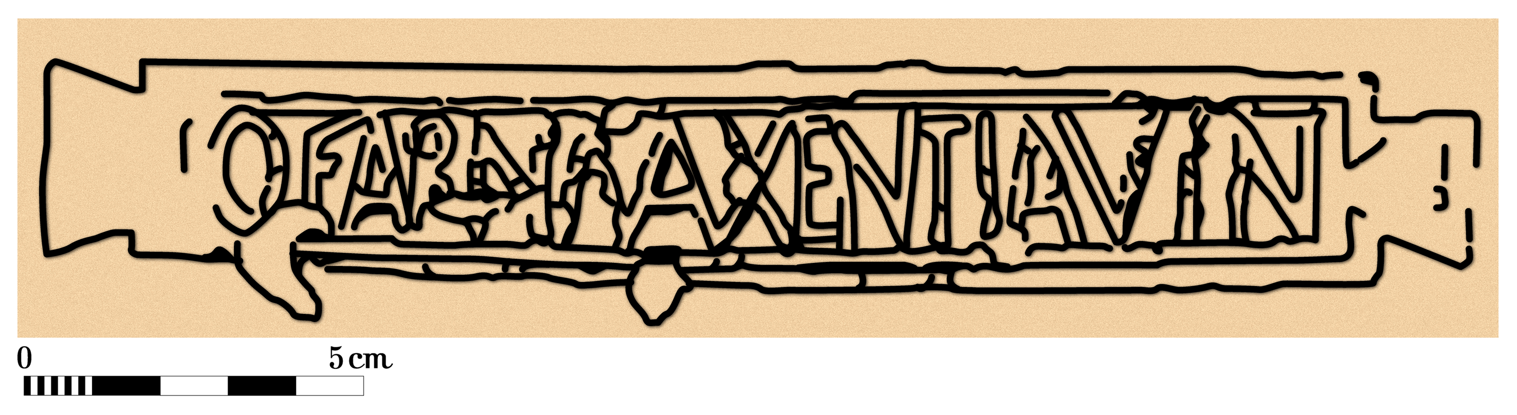 Ziegelstempel OFARNMAXENTIAVIN. Unversehrter sesquipedalis later vom Gelände des ungarischen Kastells Göd-Bócsaújtelep. Fundstelle: Quadrat 5. Verfüllung des Abwassergrabens. Umzeichnung nach einer Darstellung in: Zsolt Mráv: Archäologische Forschungen 2000–2001 im Gebiet der spätrömischen Festung von Göd-Bócsaújtelep (Vorbericht) 2002. In: Communicationes archeologicae Hungariae 2003. Népművelési Propaganda Iroda. Budapest 2003. S. 103–104.